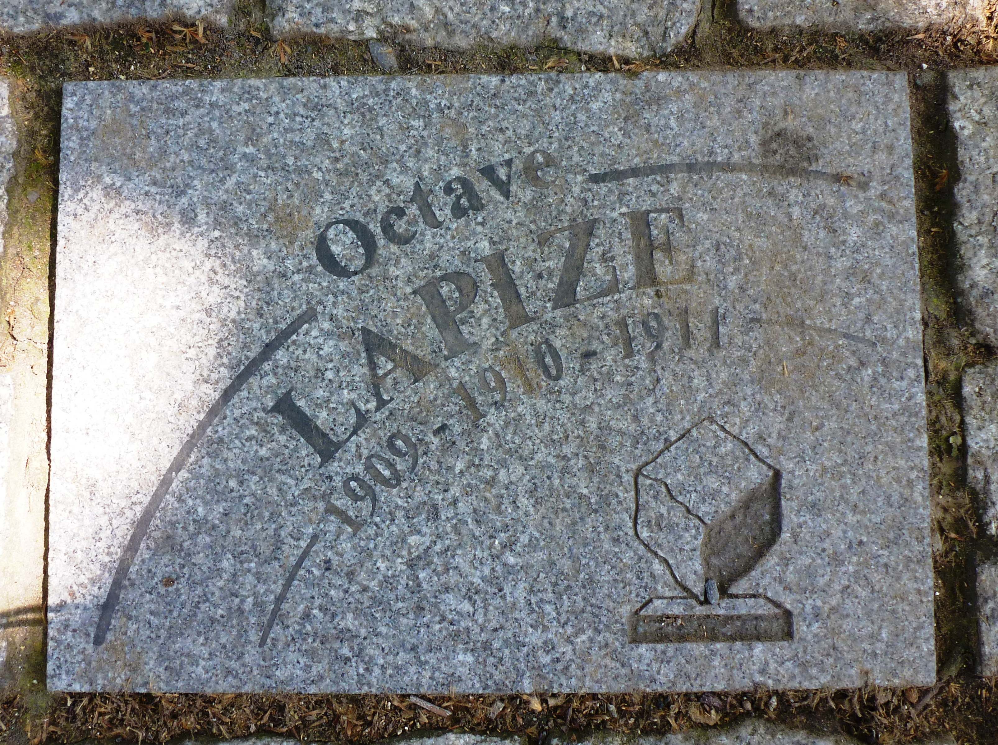 Pflasterstein für Octave Lapize auf der Allee Charles Crupelandt in Roubaix